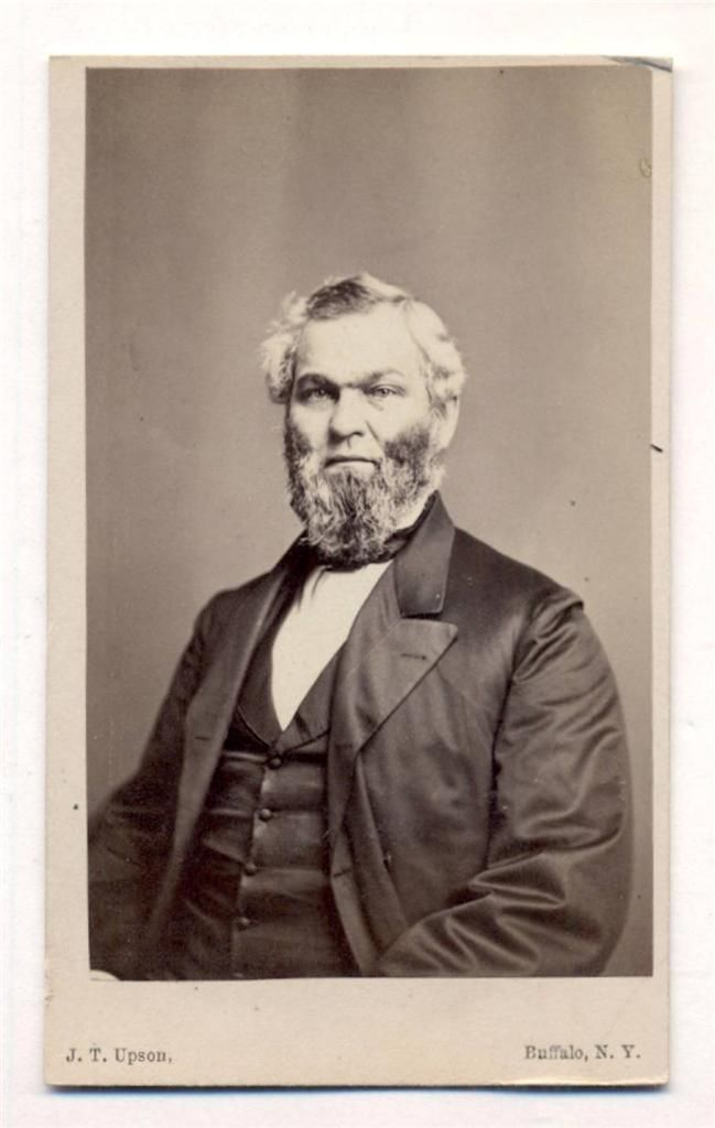 William G Fargo